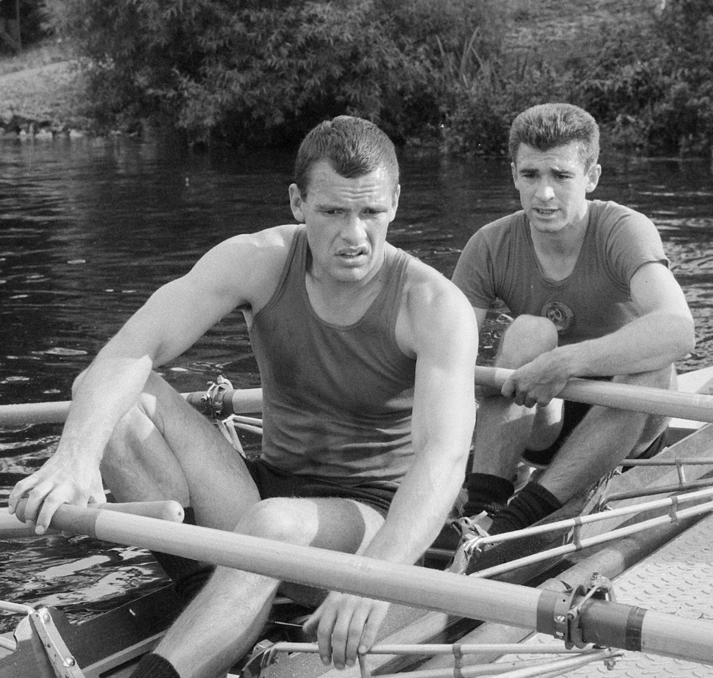 Europese Roeikampioenschappen, Russische dubbel twee